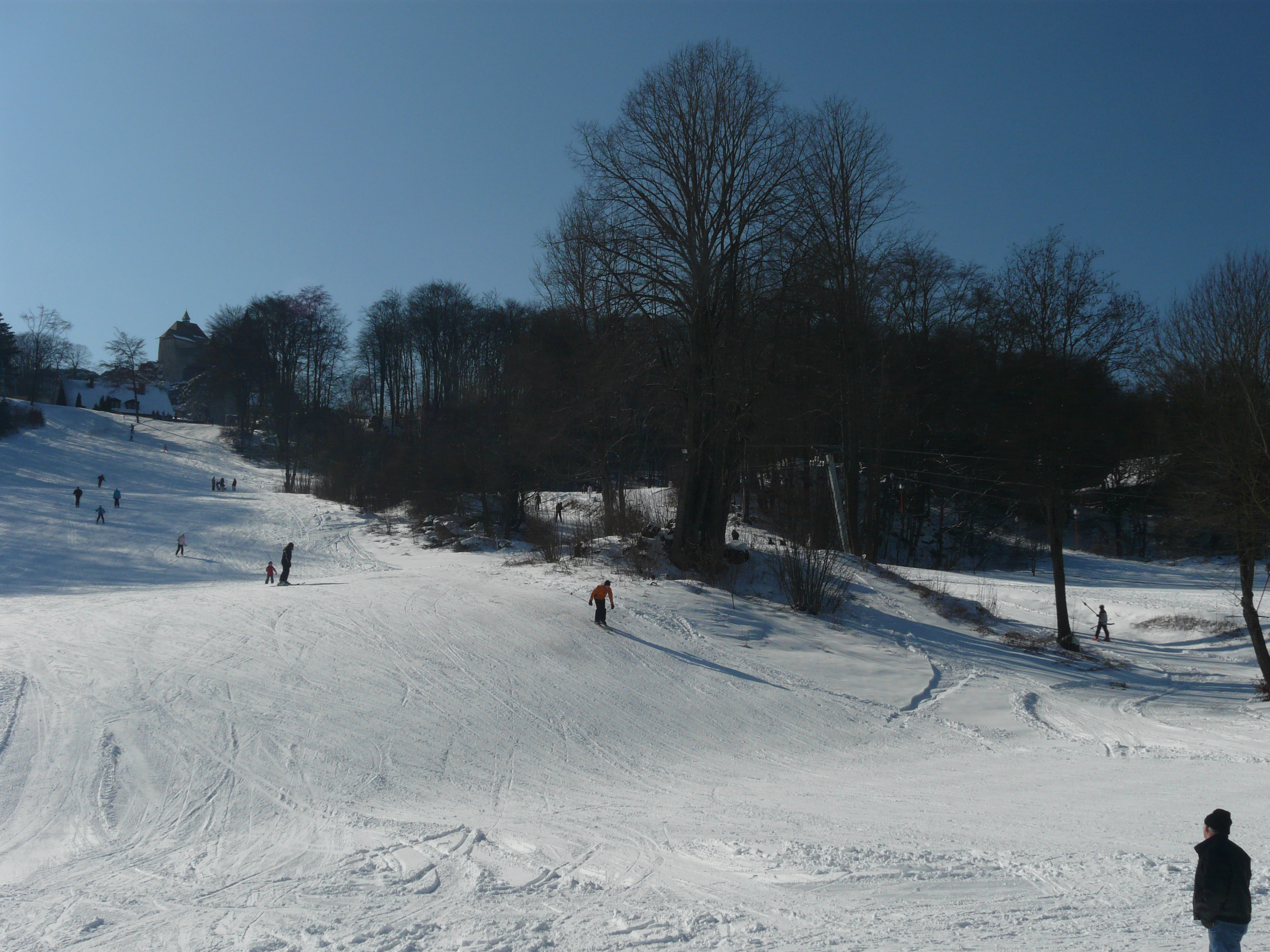 Die östlich des mittelfränkischen Ortes Hohenstein gelegene Schipiste